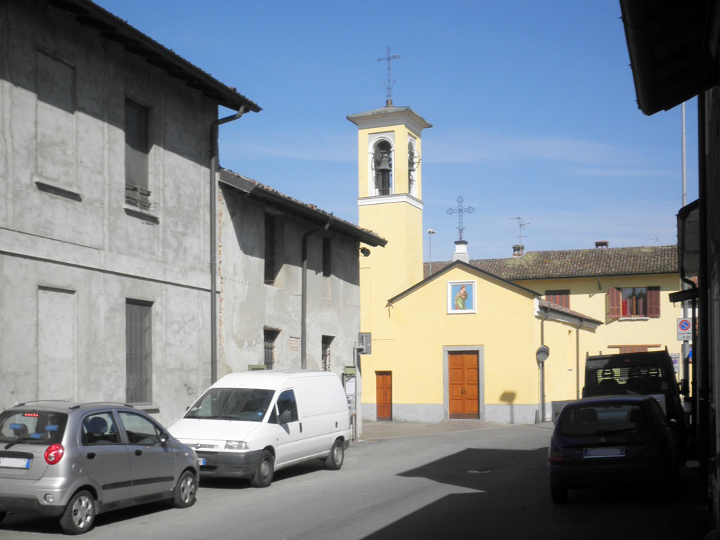 Vista dell'Olmo, frazione di Lodi.